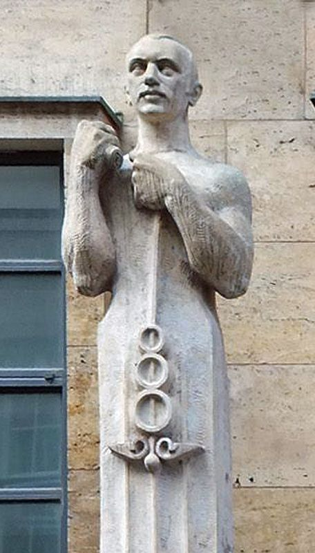 Hans Kroch, dargestellt als Fassadenfigur am Petershof in Leipzig